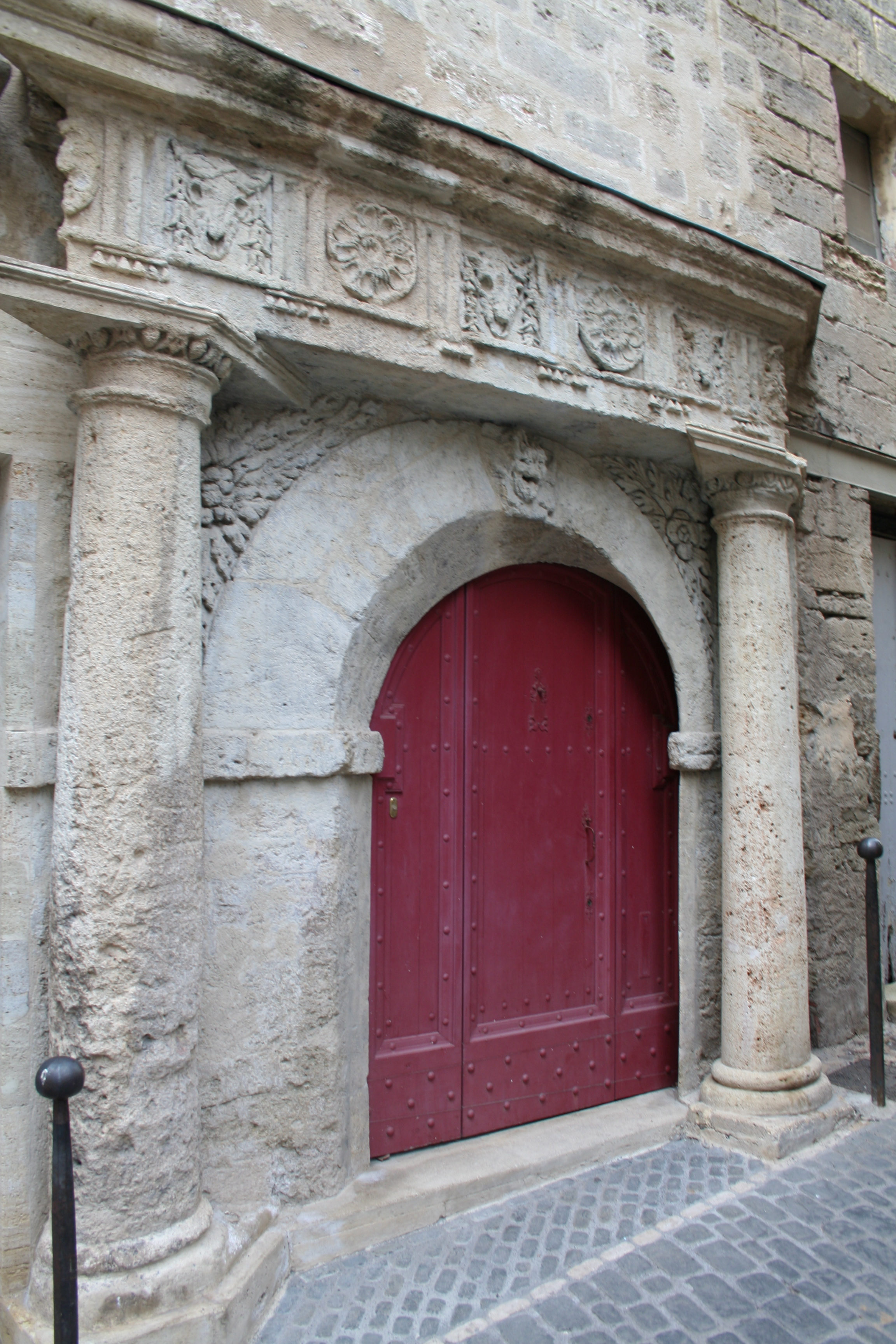 Pézenas (Hérault) - Porte "biaise" - Observer les astuces de l'architecte pour rattraper la perspective imposée par la géométrie de la rue.